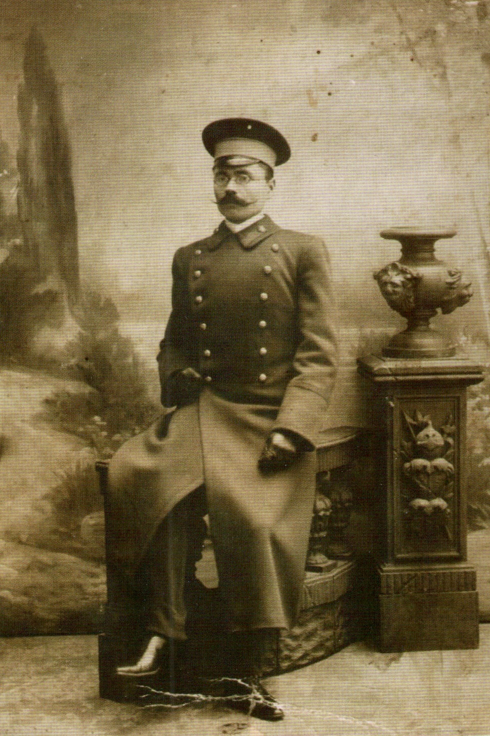 Фото, отправленное родителям Ильей Яштайкиным - студентом 3 курса историко-филологического факультета Императорского Варшавского Университета.